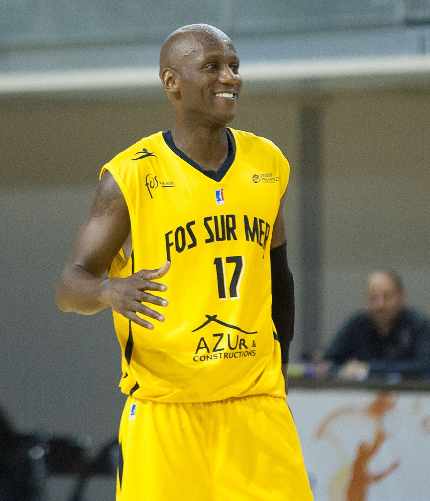 Souriant